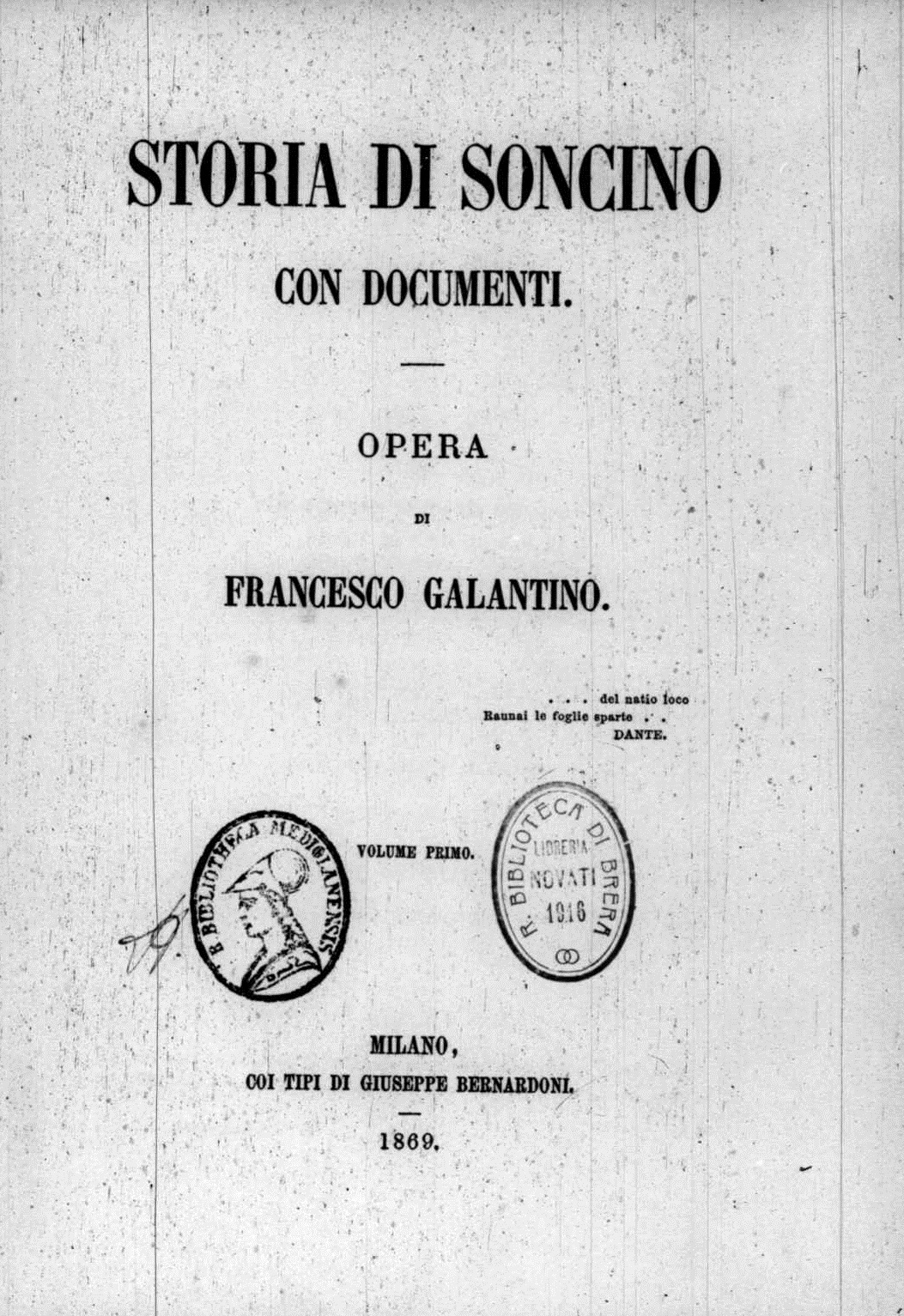 Frontespizio